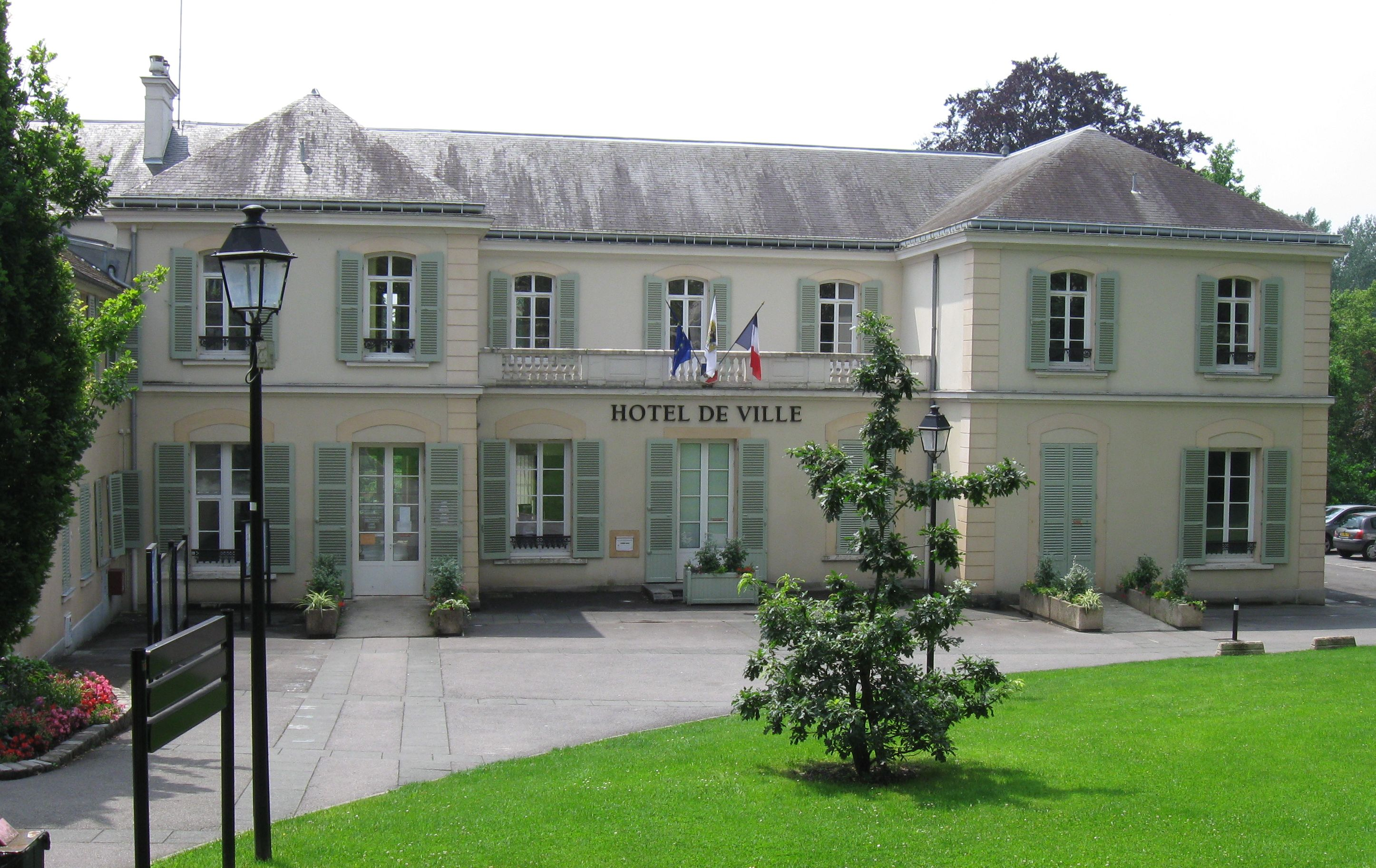 L'hôtel de ville de Thorigny-sur-Marne (Département de Seine-et-Marne, région Île-de-France)